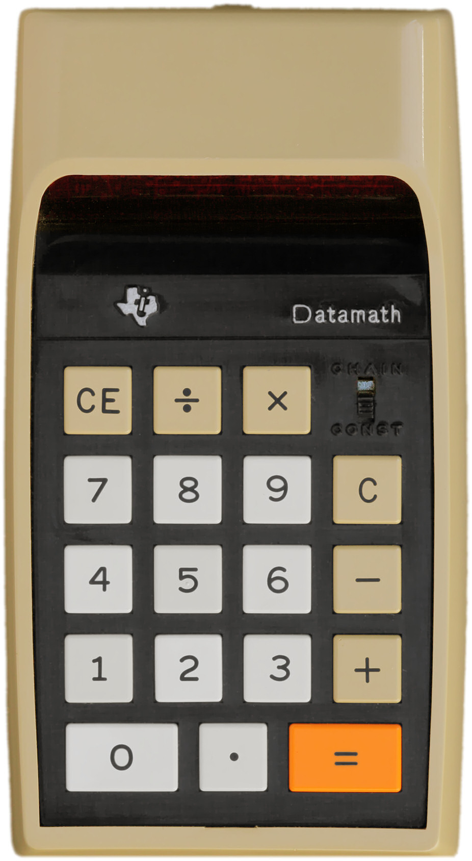 Texas Instruments Electronic Calculator "TI Datamath 2500"